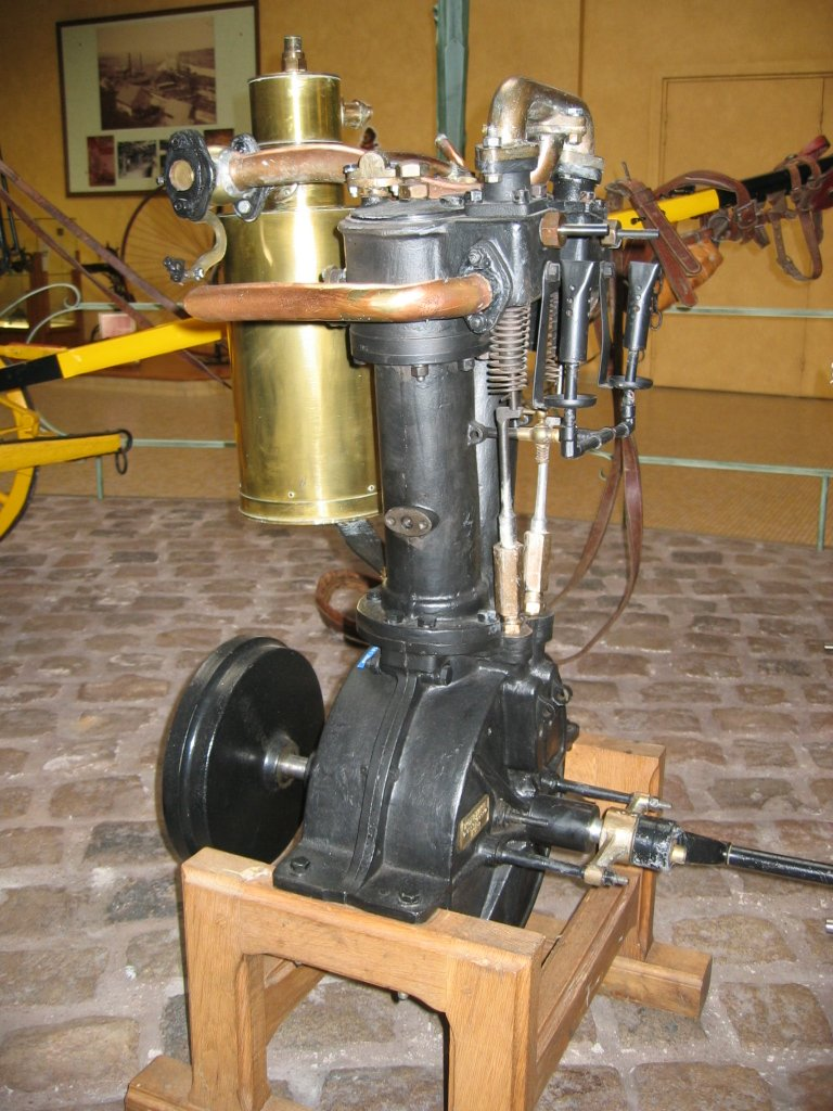 Moteur V2 Daimler (1891 - 1894) - 4 temps - 2 à 3.75 ch - 565 à 1645 cm3 - Musée Peugeot Sochaux